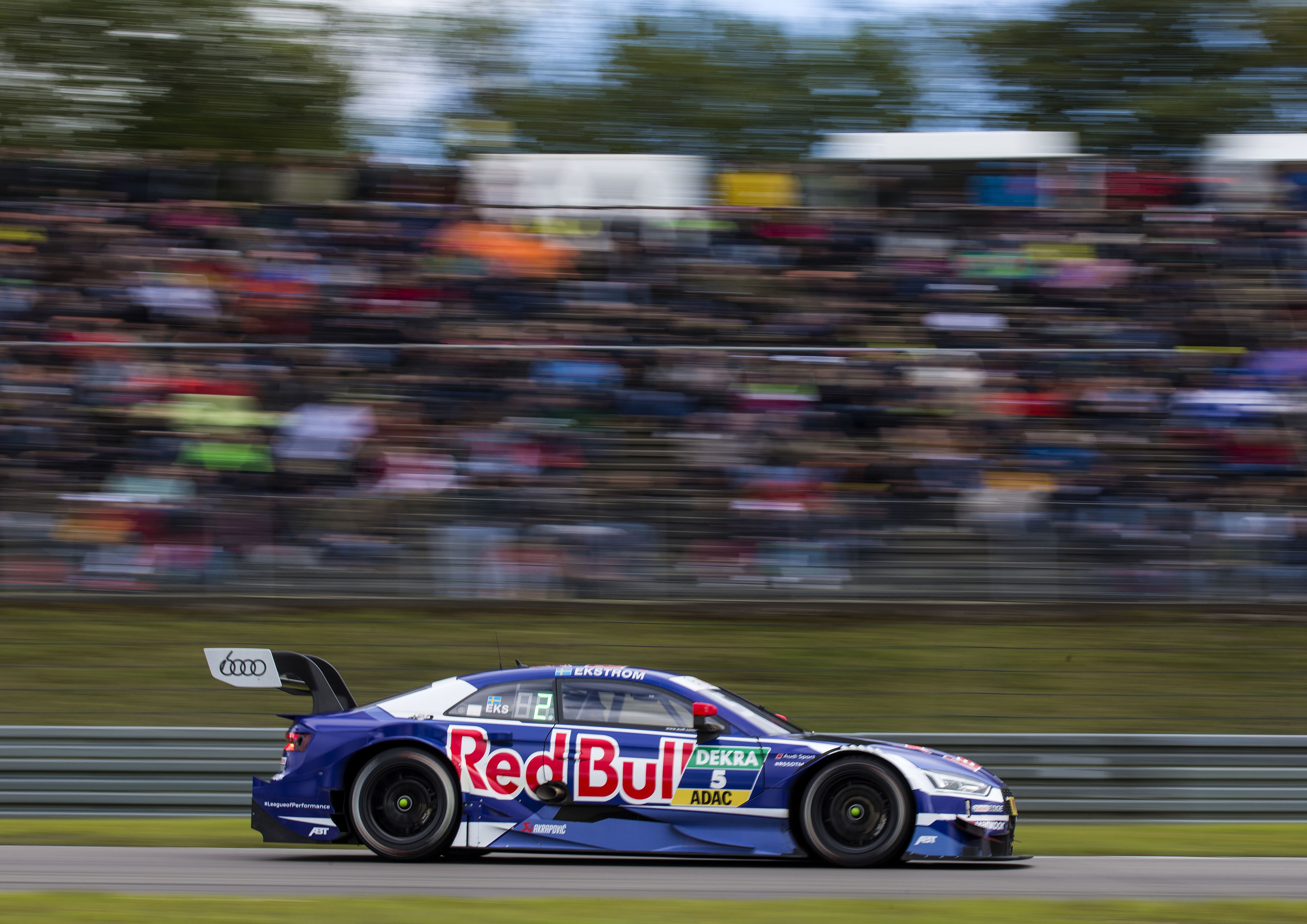 Mattias Ekström, Red Bull Audi RS 5 DTM, DTM Nürburgring 2017